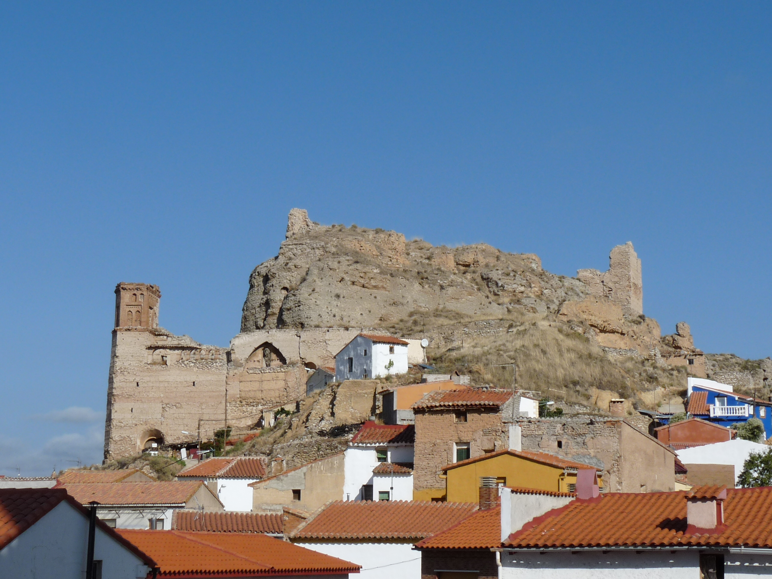 Maluenda - Iglesia de San Miguel (s. XV) en ruinas - Ruinas del castillo al fondo